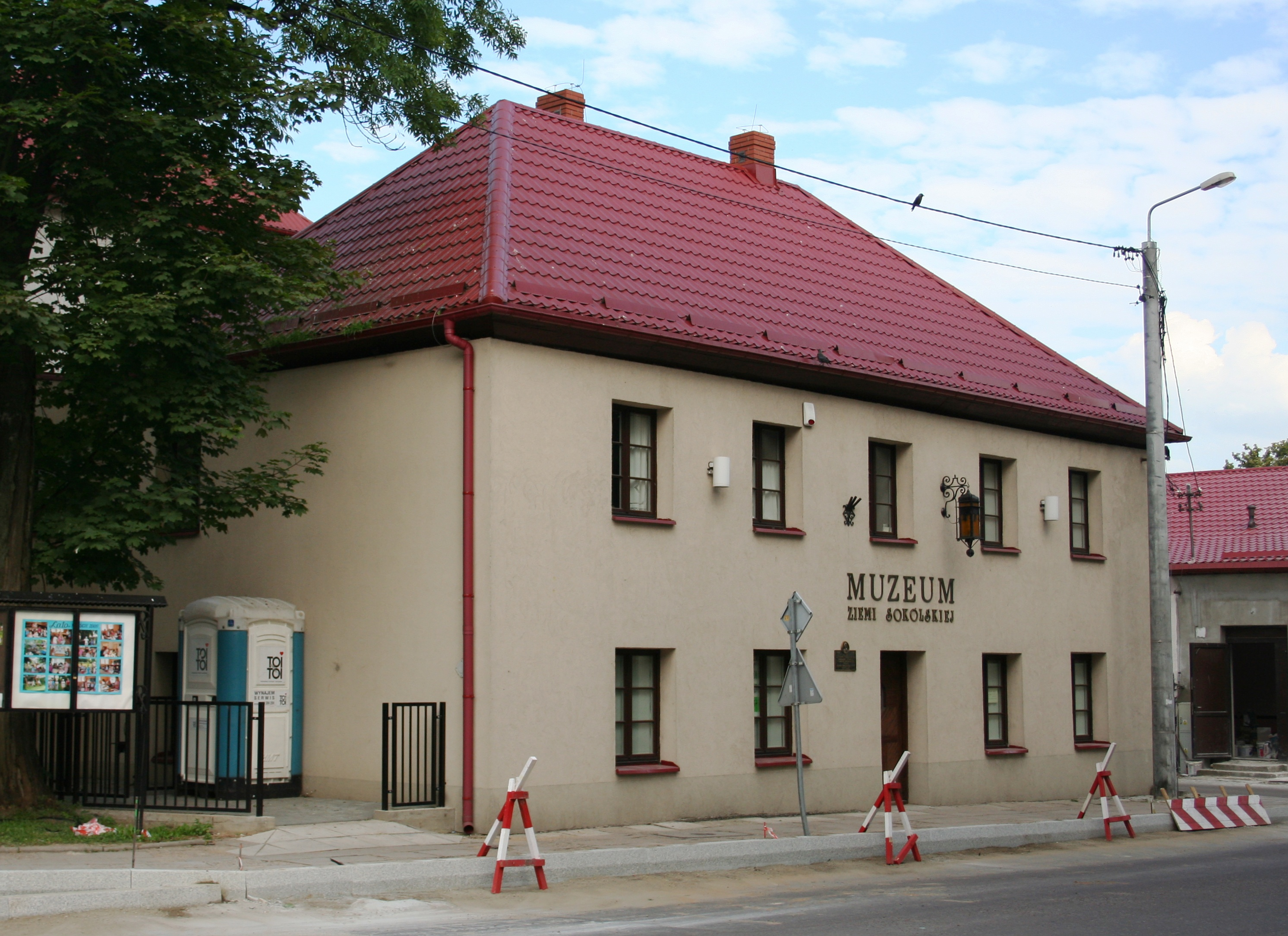 Muzeum Ziemi Sokólskiej, woj. podlaskie